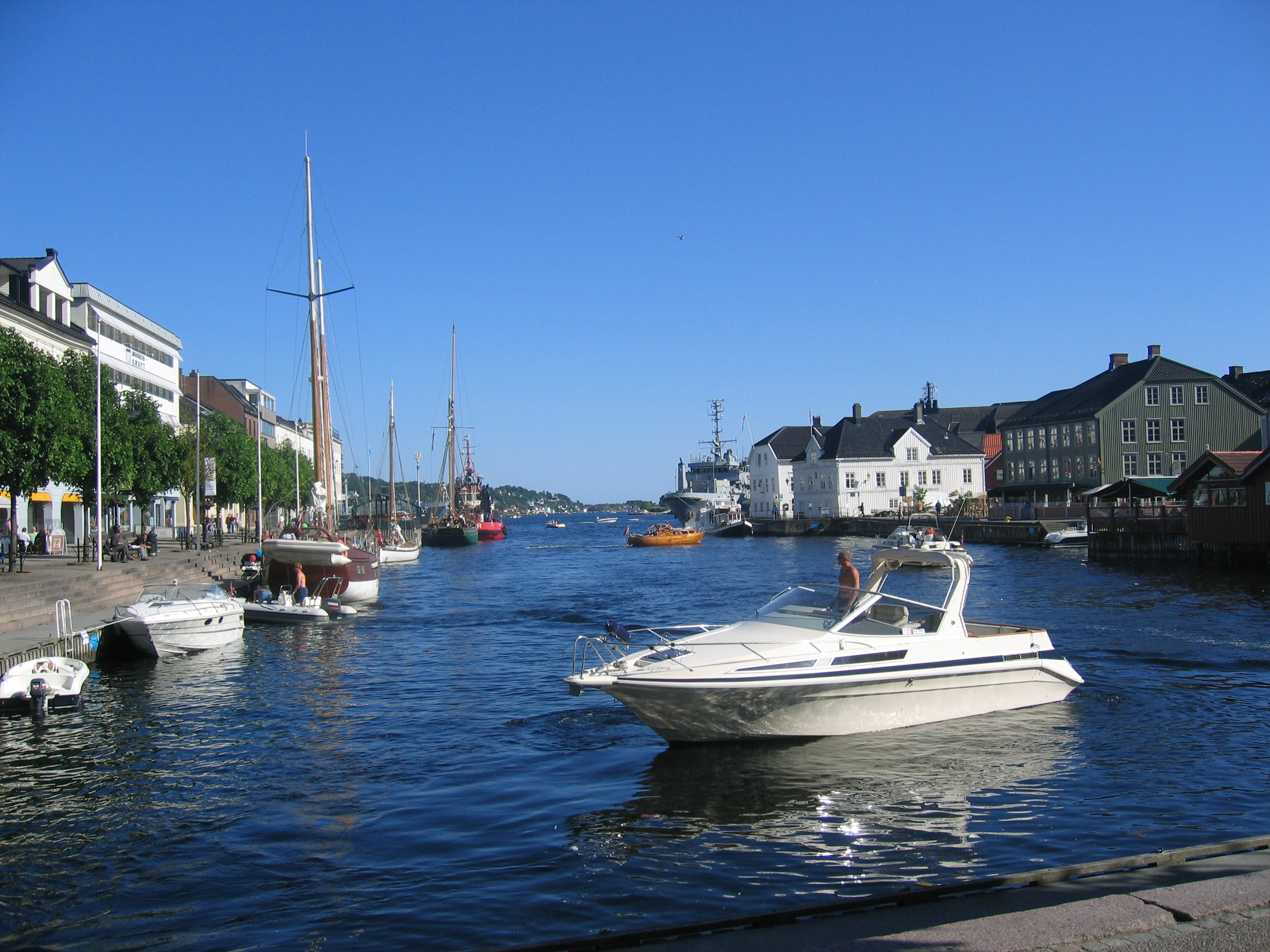 En sommerdag i Pollen i Arendal, Tyholmen til høyre.